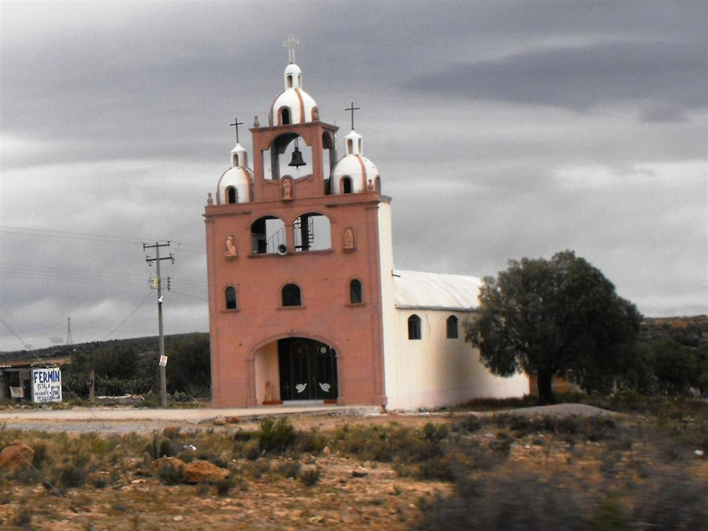 Templo Cerro Prieto